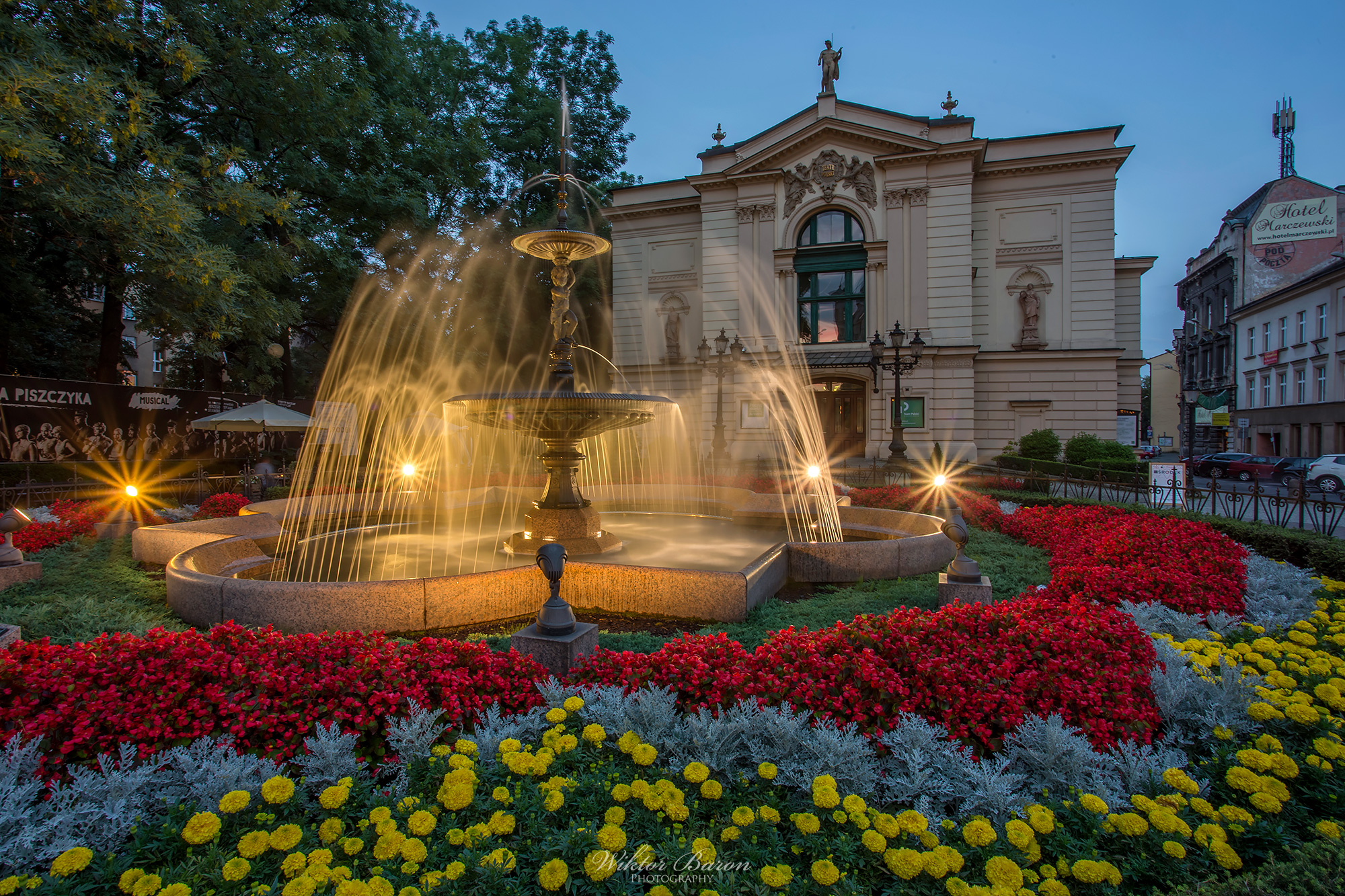 Bielsko-Biała, Teatr Polski, 1888-1890, 1905